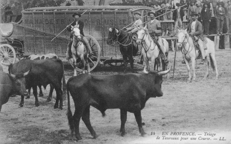 Triage des taureaux d'une manade avant une course en Camargue (France) dans les années 1900.